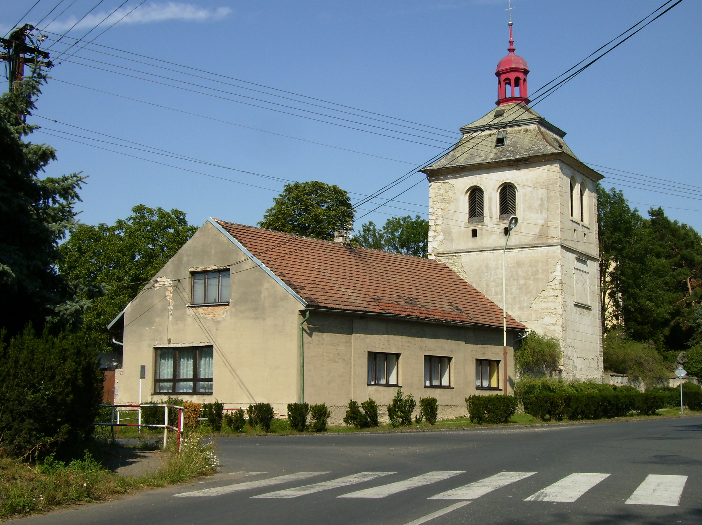 Věž u kostela v Kostomlatech nad Labem.